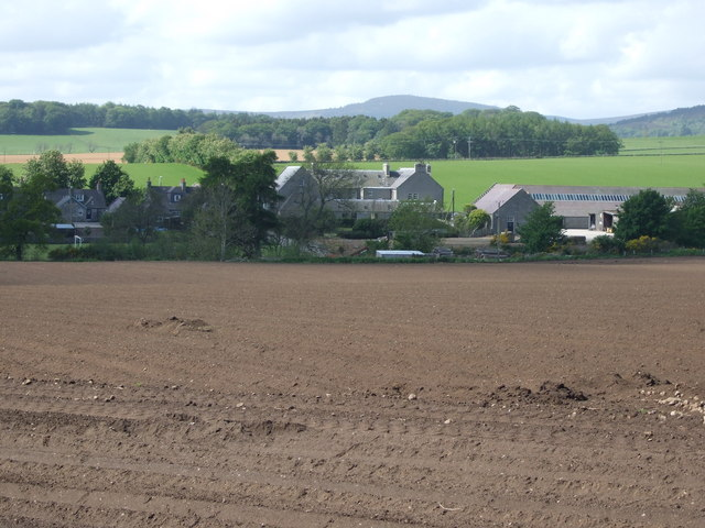 Dunecht, Aberdeenshire